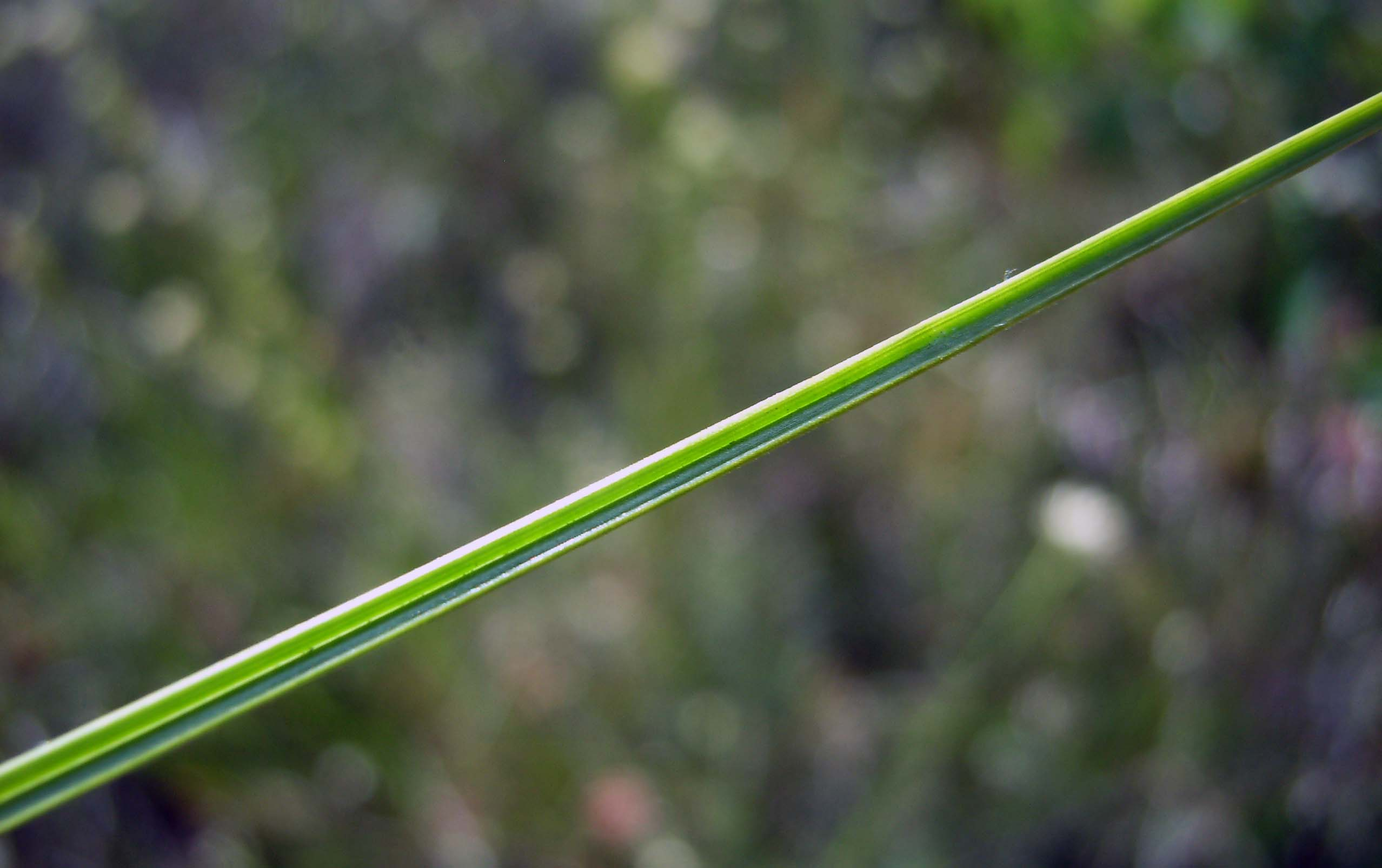 Rinnige Blattspreite des Weißen Schnabelriedes (Rhynchospora alba)